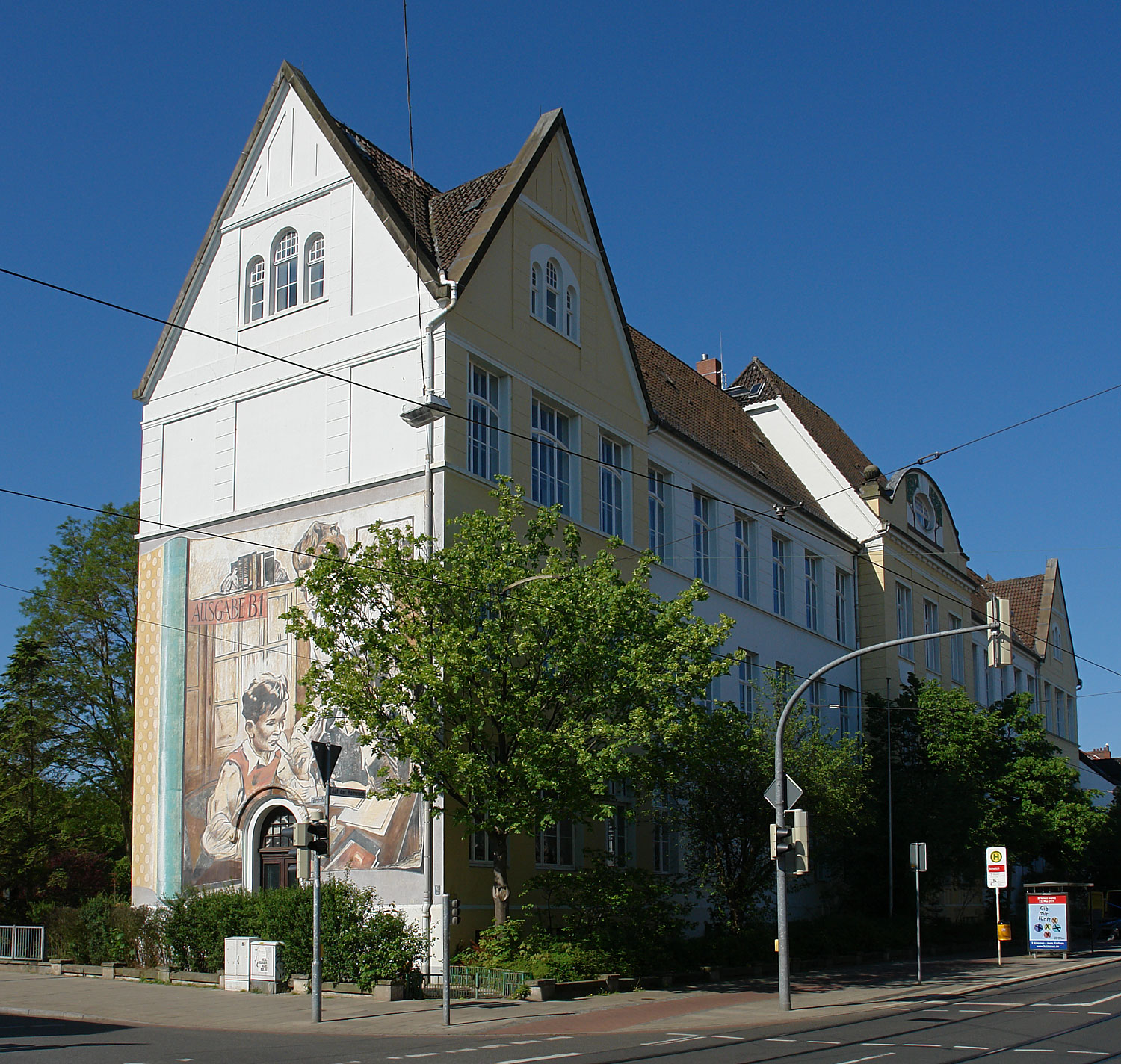 Schule Auf der Hohwisch 61, Bremen-Hemelingen.Erbaut 1903. Architekt: Hugo Weber Das abgebildete Objekt ist ein geschütztes Kulturdenkmal in der Freien Hansestadt Bremen, mit der Nr. 0096 beim Landesamt für Denkmalpflege registriert.